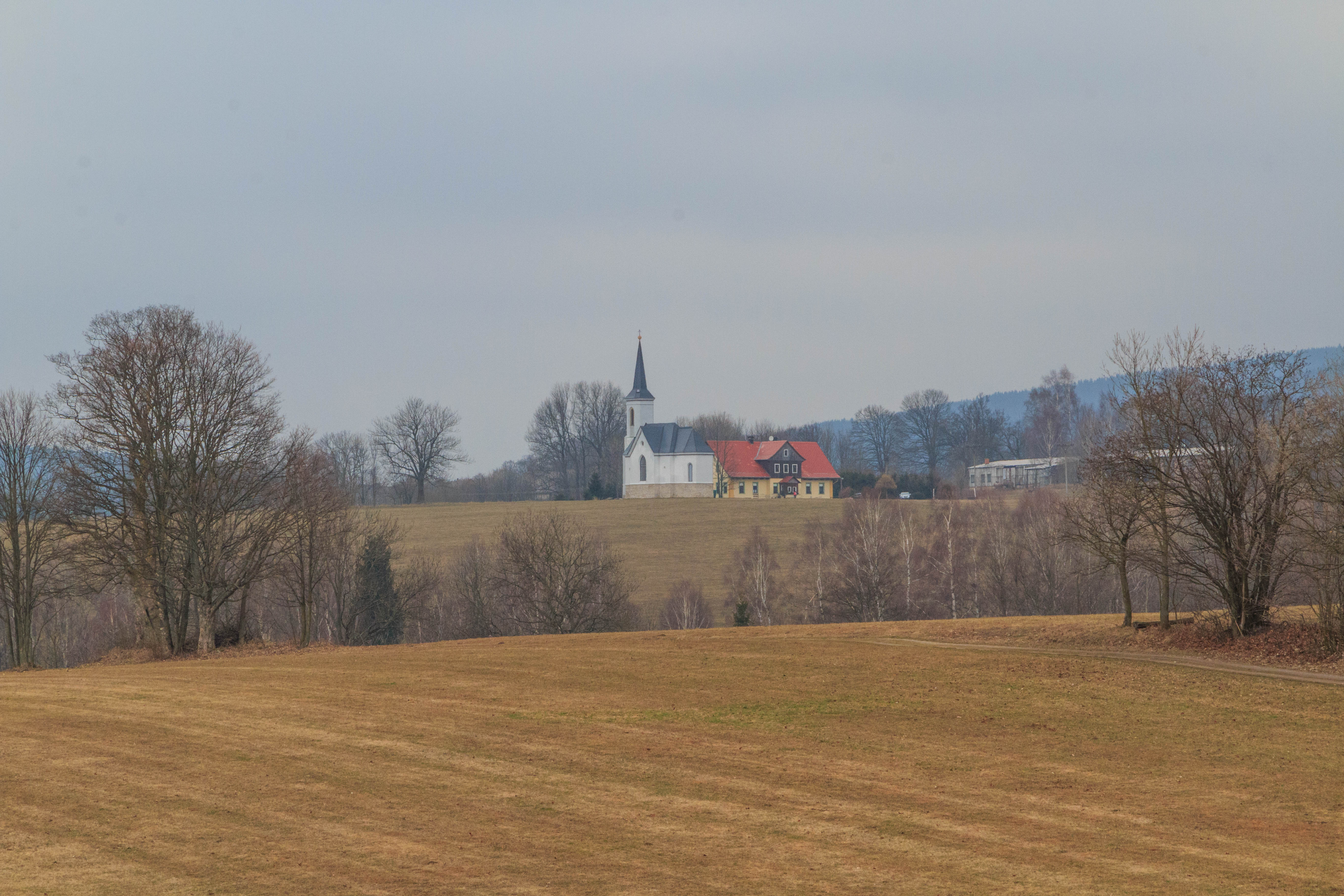 Kunčina Ves - kaple svaté Anny